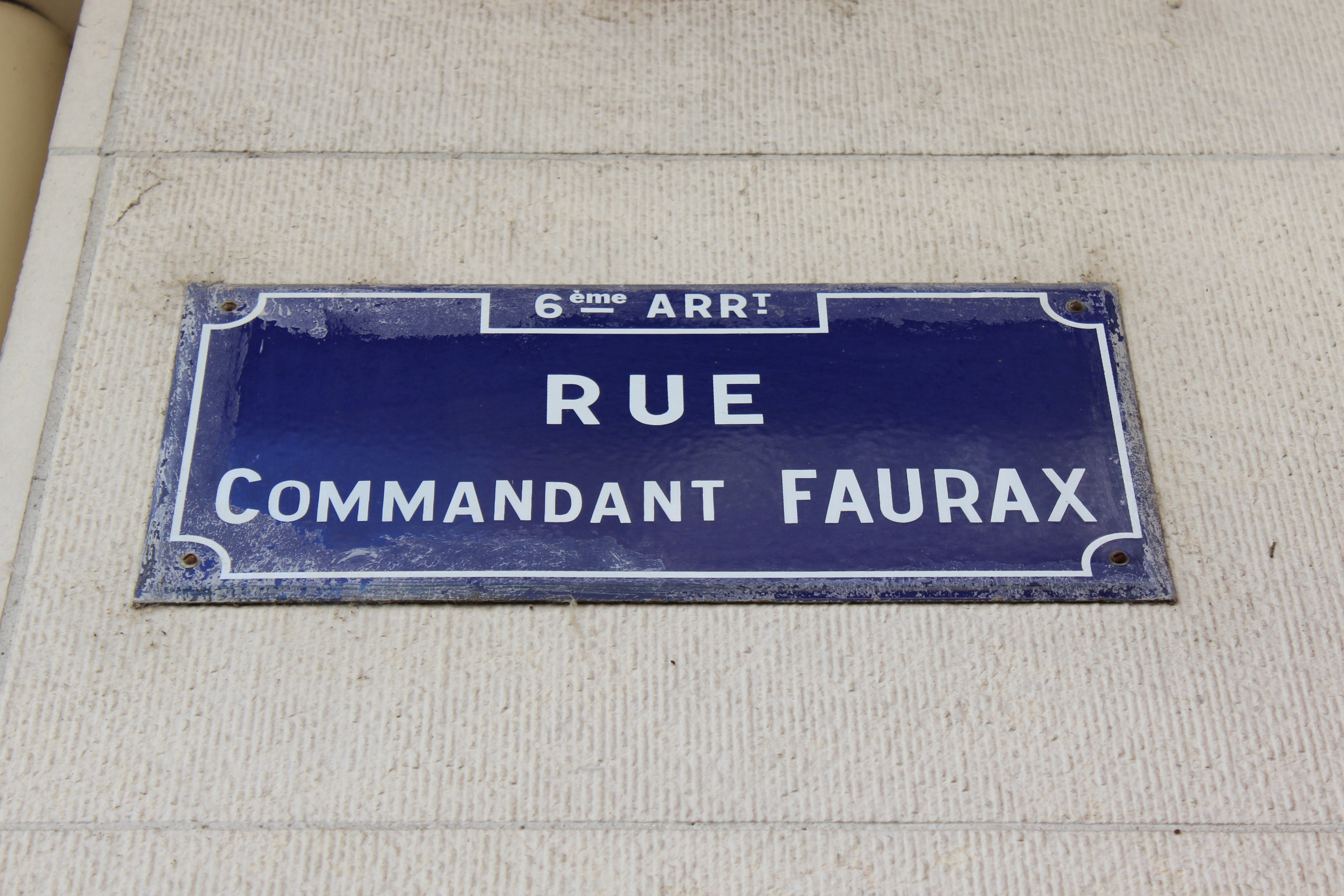 Rue Commandant-Faurax.